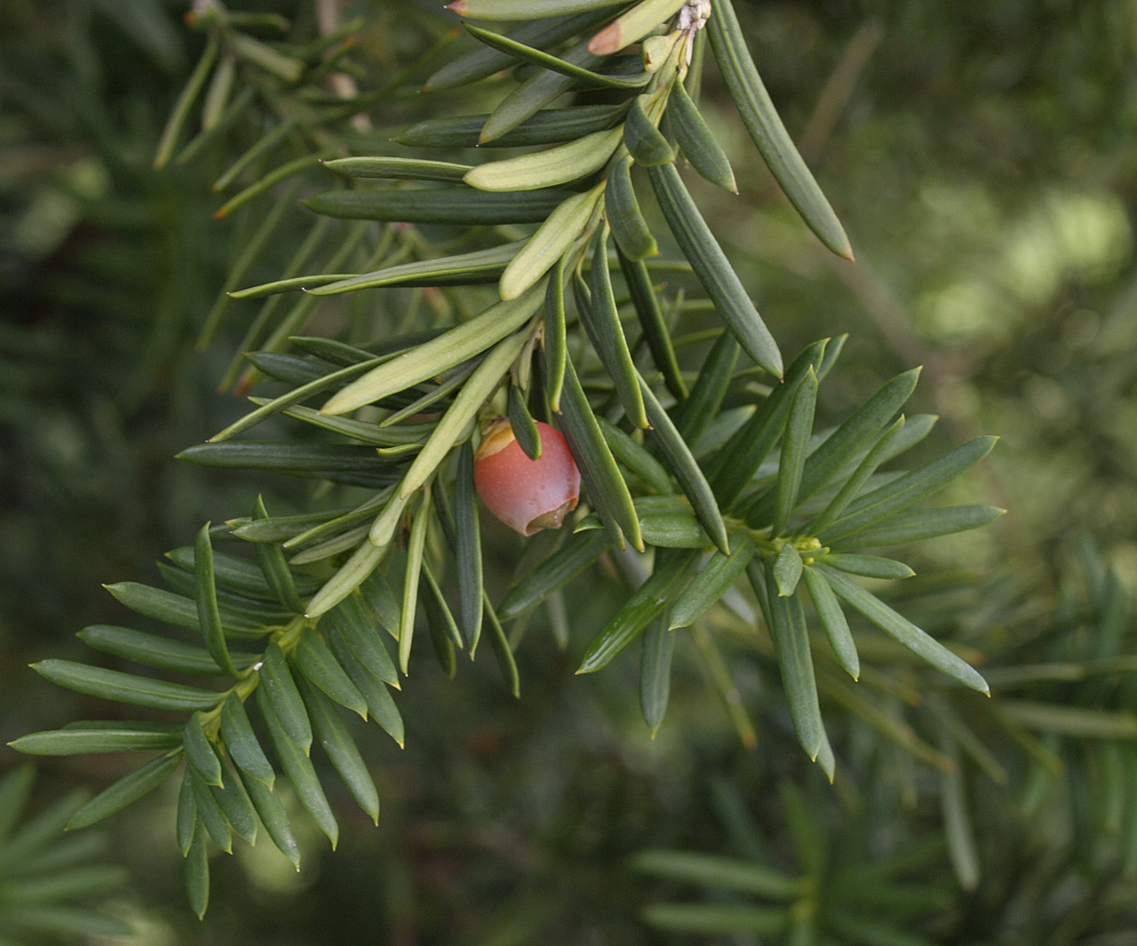 Taxus baccata, fruto maduro. Parque del Oeste, Madrid.